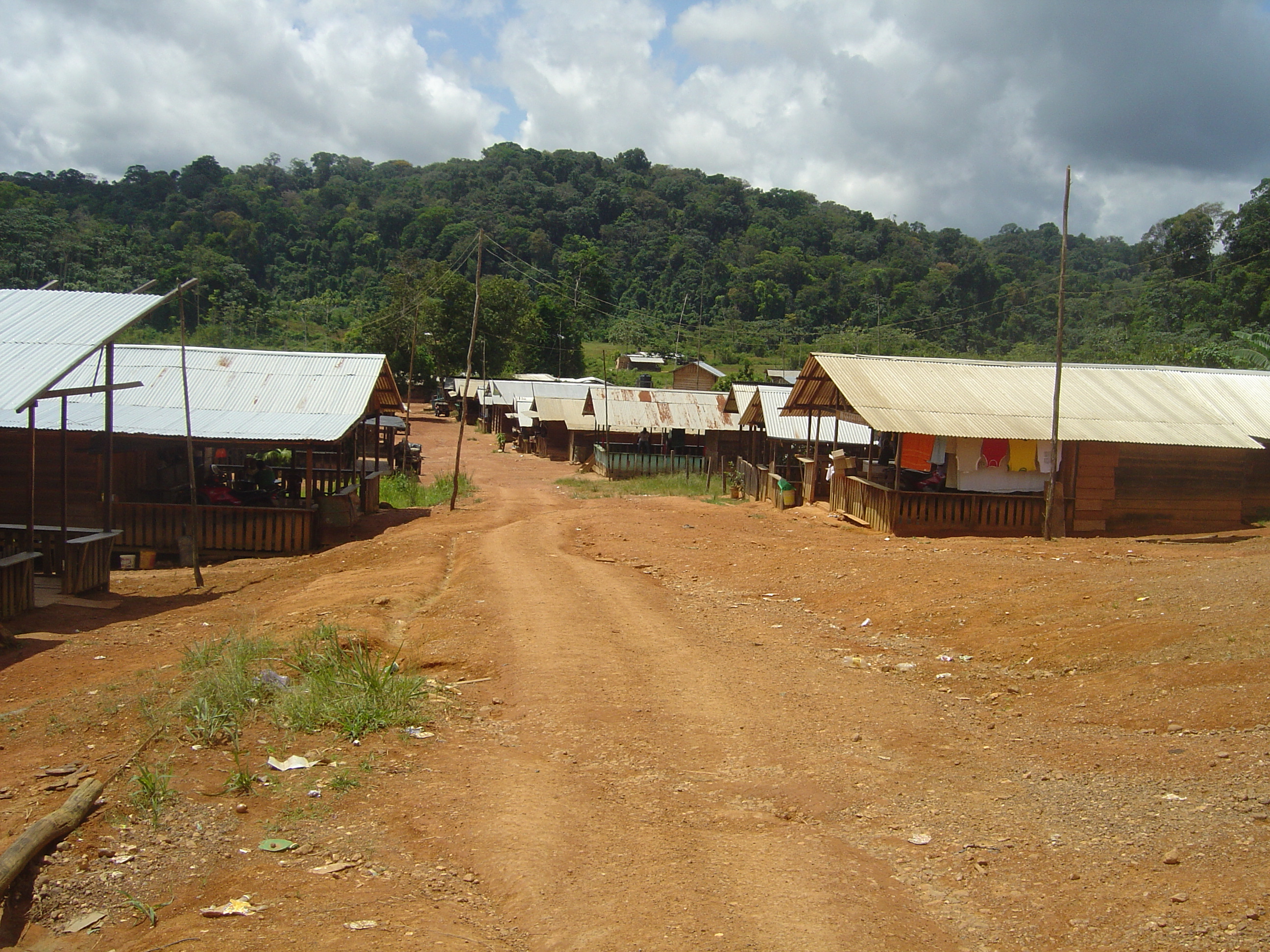 Zicht op bebouwing van het nieuwe Benzdorp (juli 2007) in Suriname